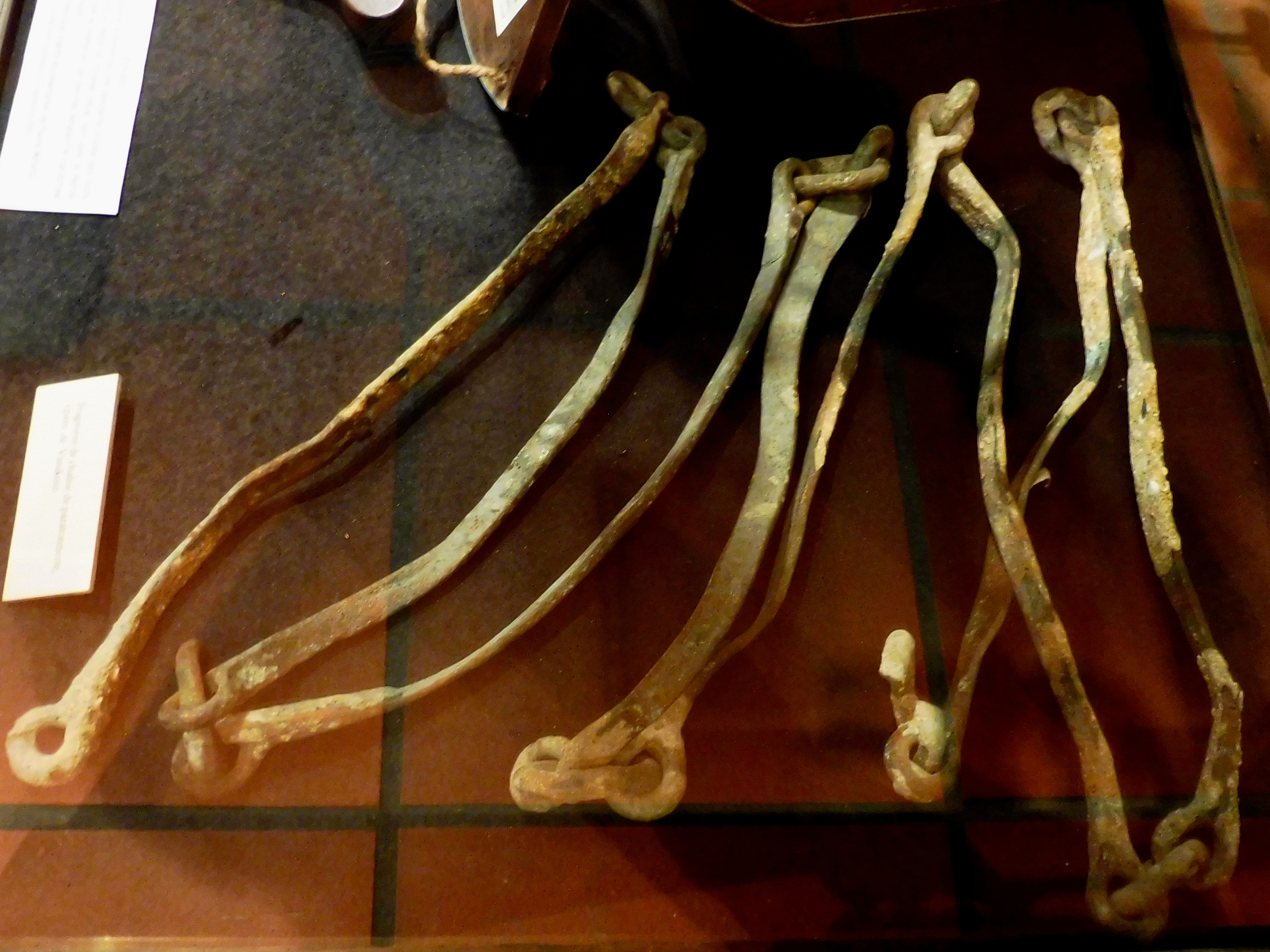 Paratonnerre de l'expédition Lapérouse exoposé au musée d'Albi.